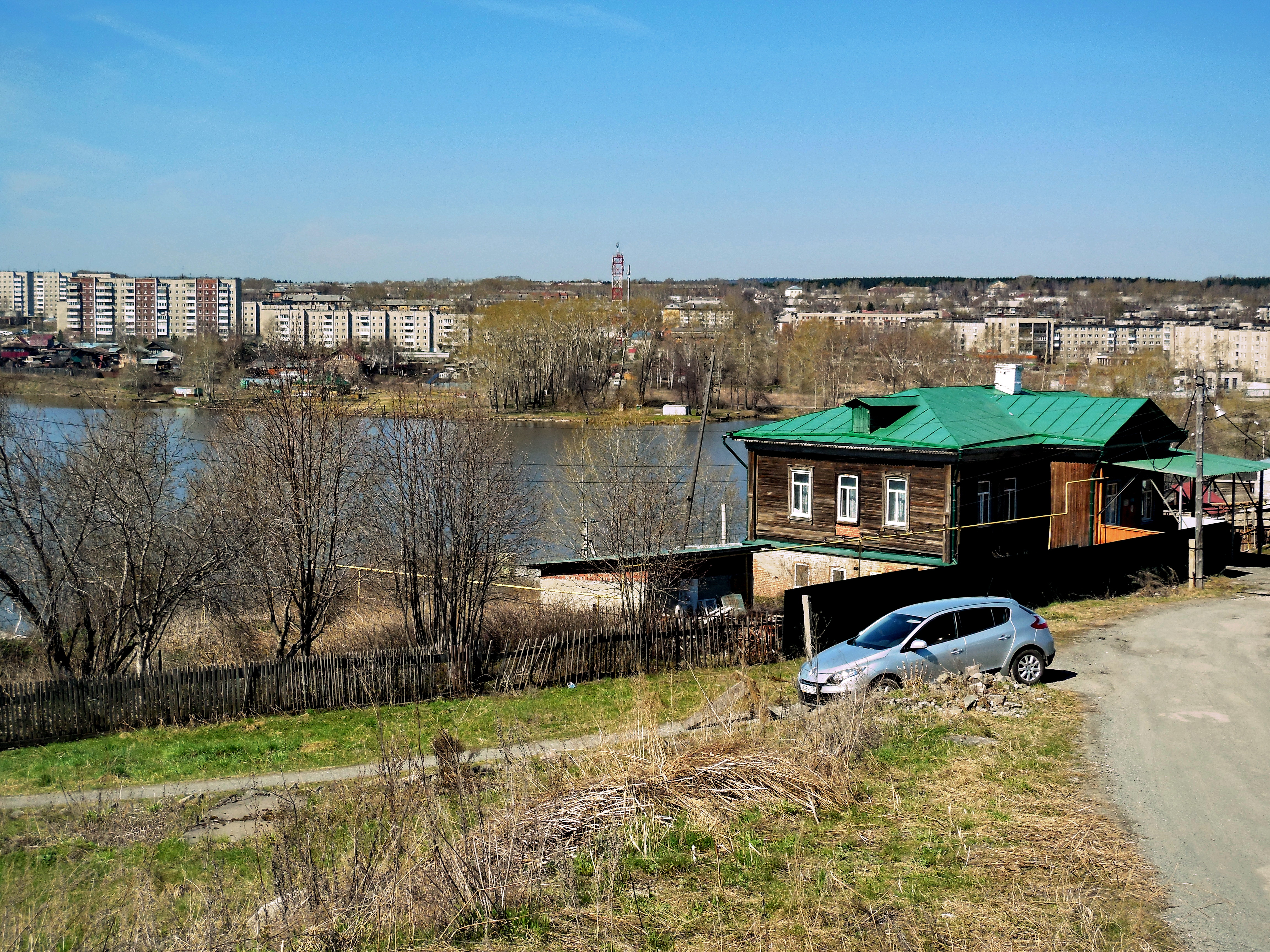 Ревда